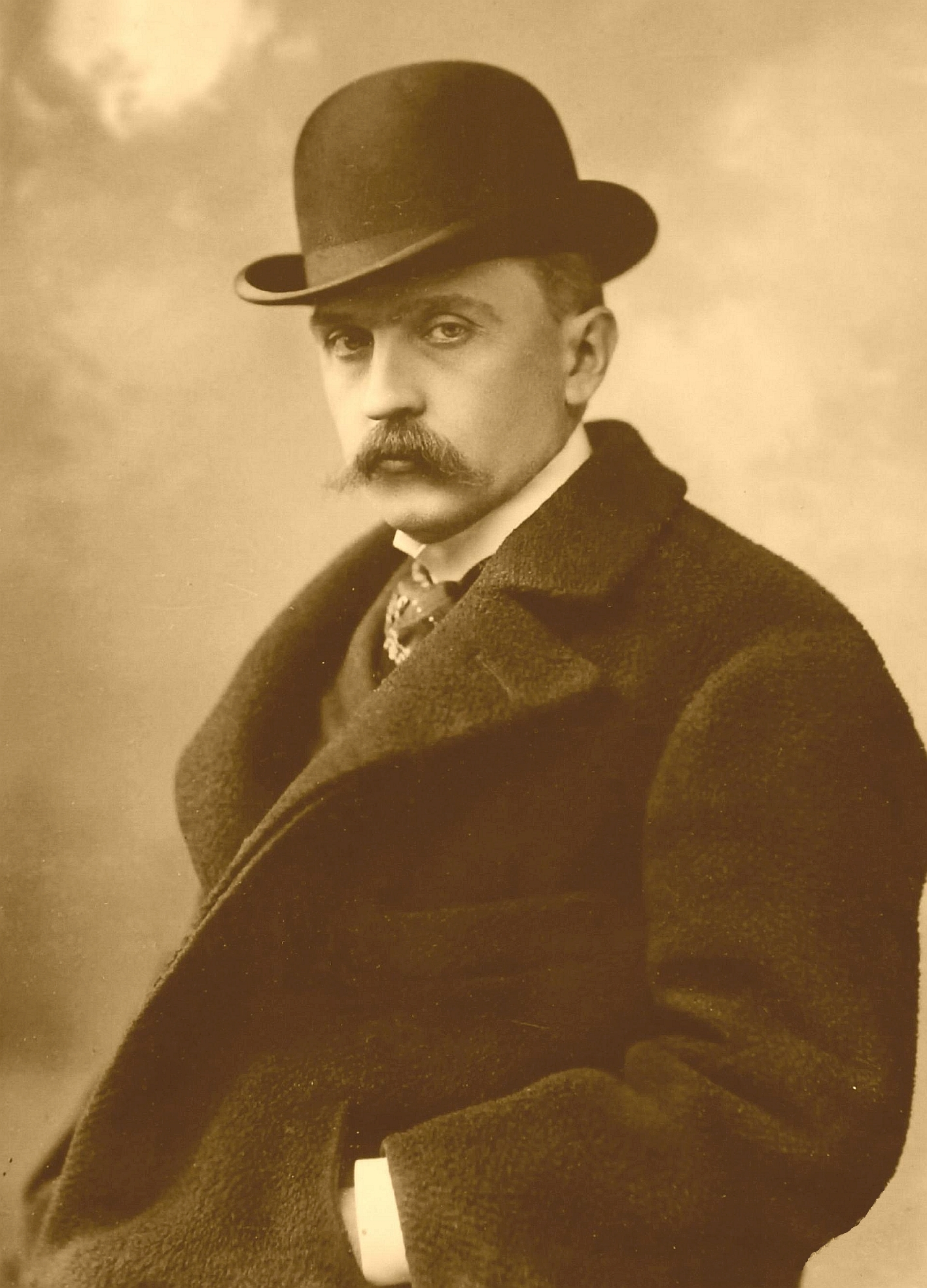 Aggházy Károly zongoraművész, Liszt Ferenc növendéke, Hubay Jenő kamarapartnere.